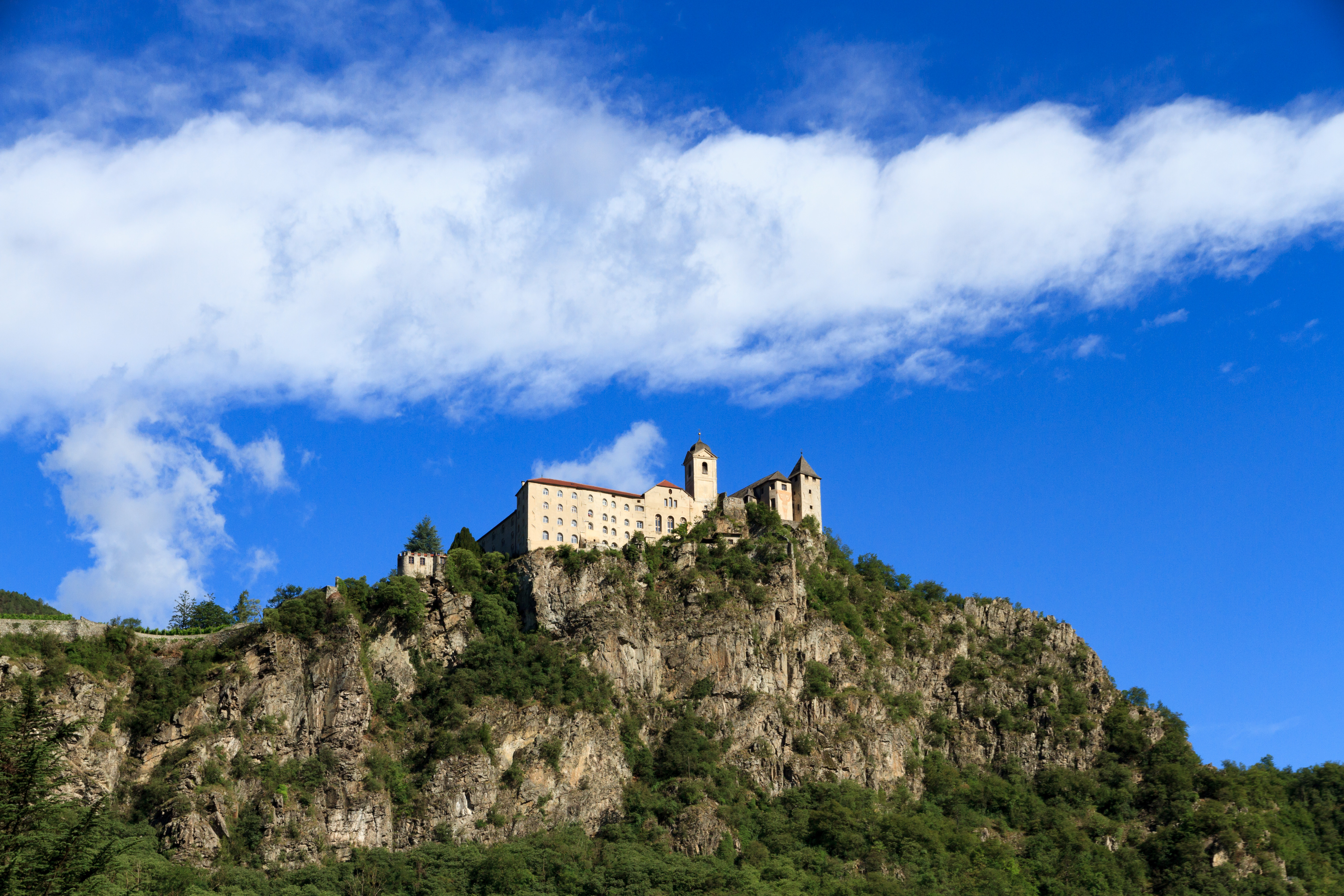 Kloster Säben